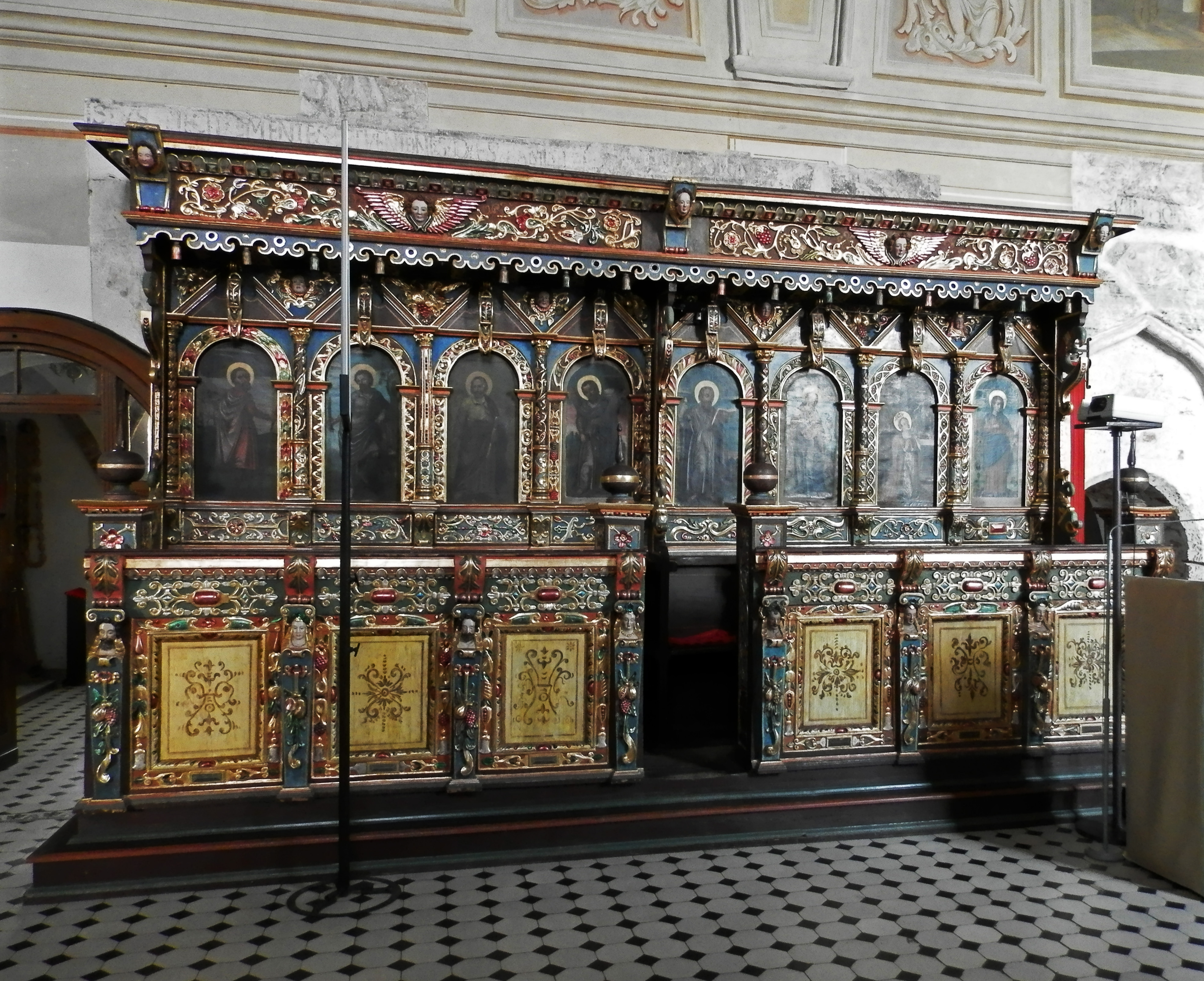 Nieszawa, Kościół św. Jadwigi w Nieszawie Wikidata has entry Q11746730 with data related to this item.